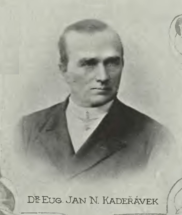 Portrét – Eugen Kadeřávek (1840-1922), Český katolický kněz.